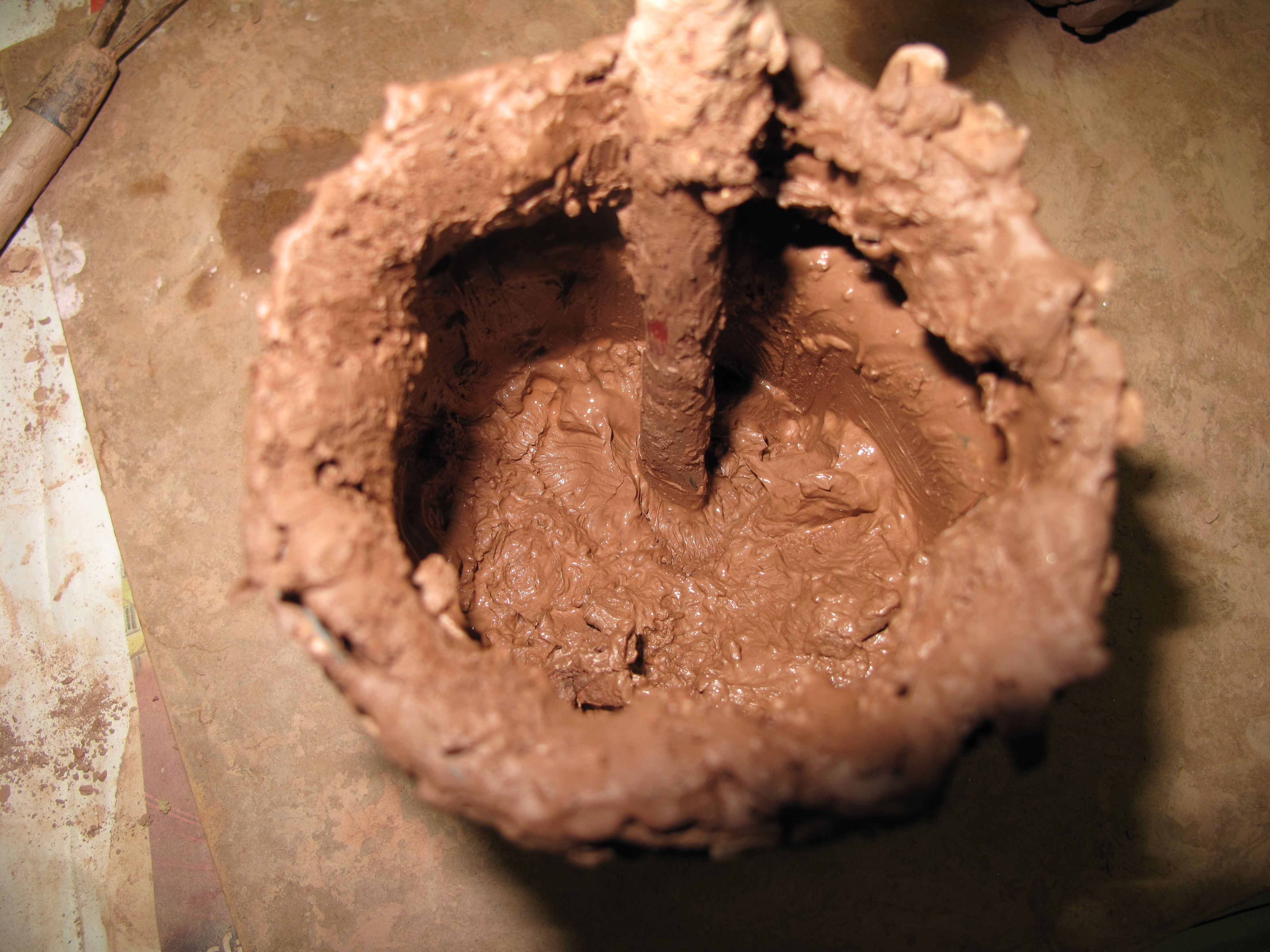 Šlikr - je pasta z keramické hlíny, která se používá v keramice ke slepování a zamazávání prasklin. Šlikr se vyrobí zřděním keramické hlíny s vodou. Ateliér Hruška, Praha Smíchov.